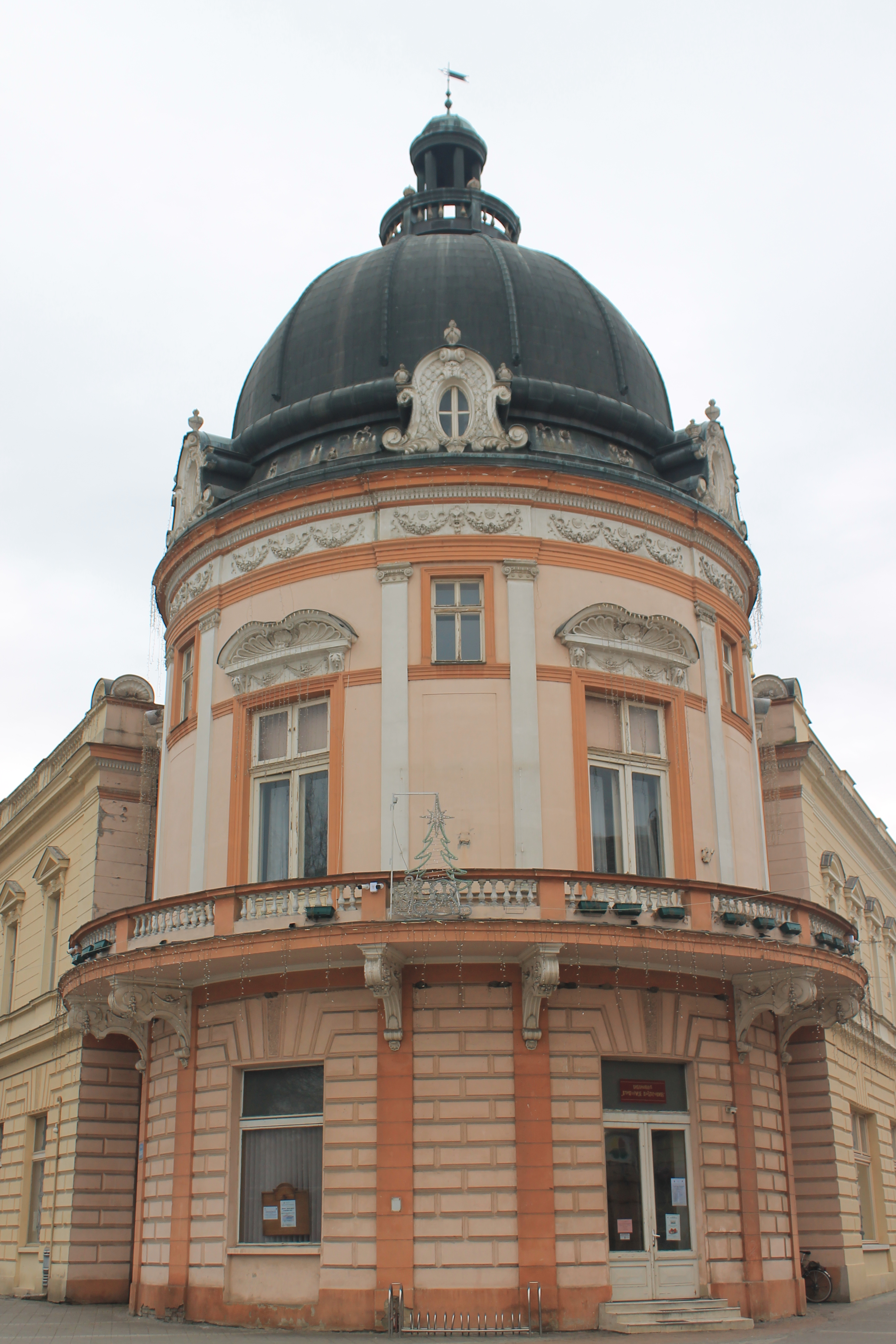 Srpski dom, Sremska Mitrovica